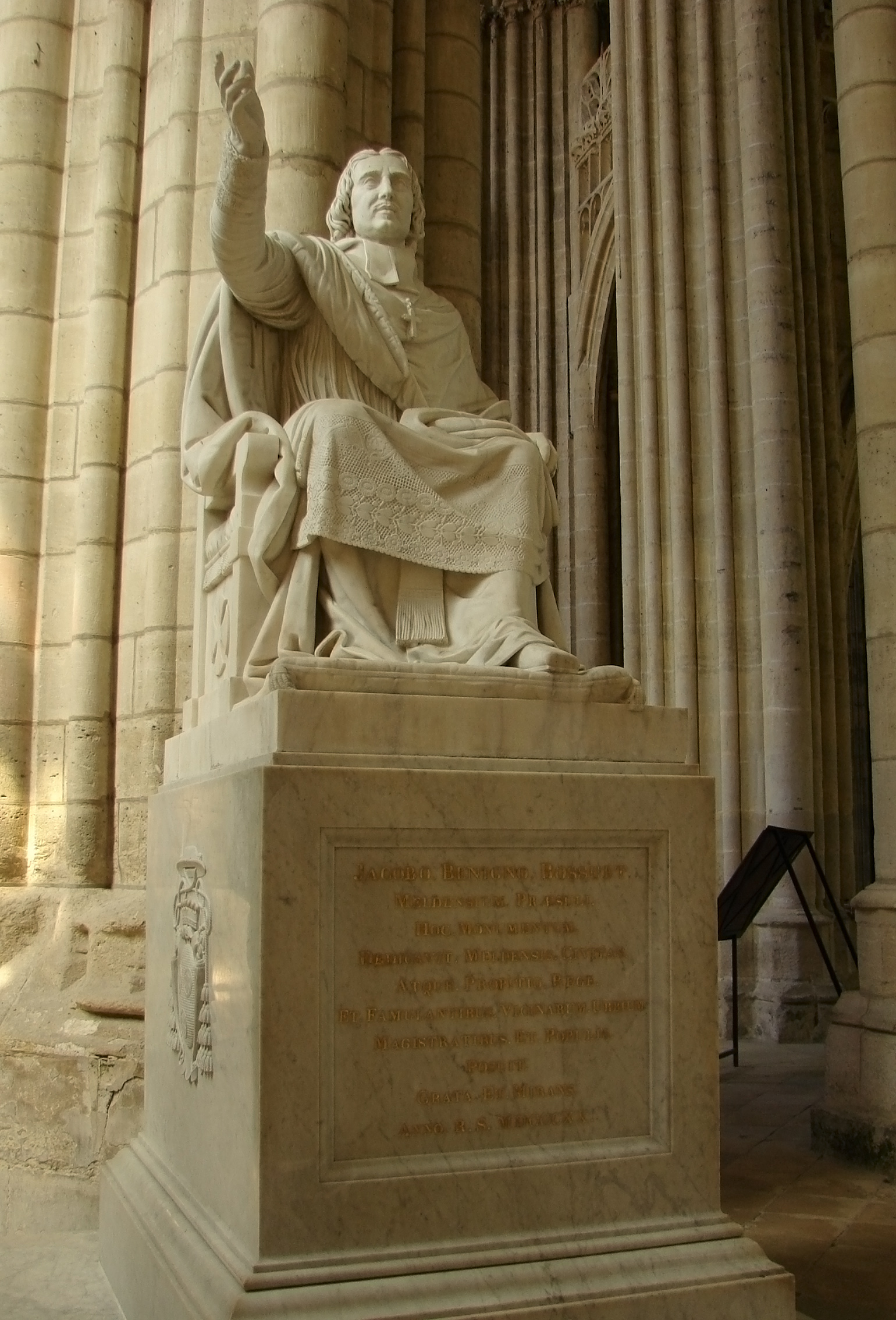 Monument à Bossuet, élevé en 1820. Cathédrale Saint-Etienne de Meaux.